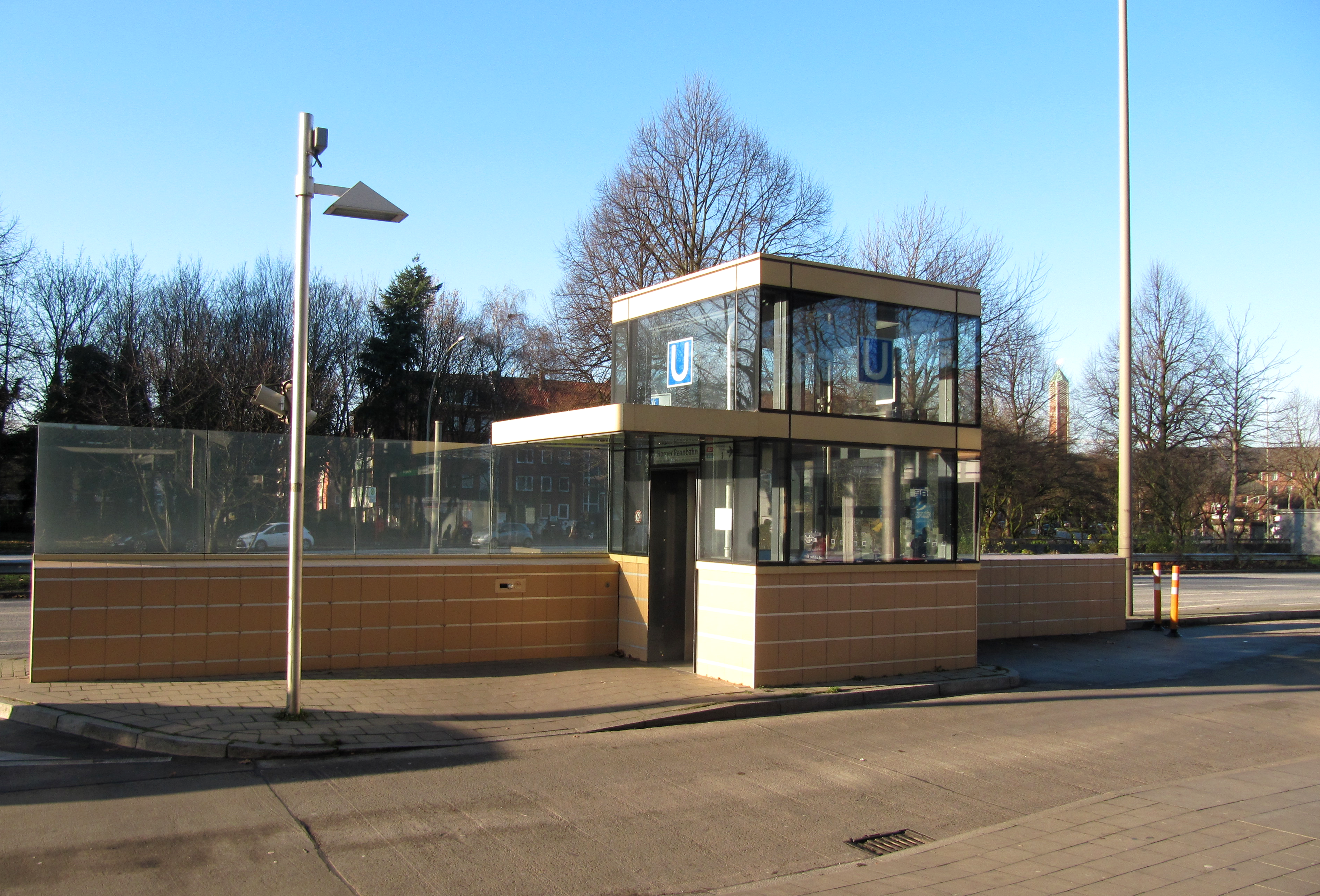 Fahrstuhl U-Bahn Horner Rennbahn Hamburg